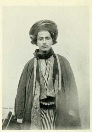 Retrato de un jefe de la tribu Jaf.